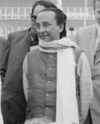 LPG Dedelow, Delegation aus Bangladesch ADN-ZB Bartocha 20.6.1973 Bez.Neubrandenburg: Awami-Liga-Delegation besuchte LPG-Die Delegation der Awami-Liga der VR Bangladesh besuchte am 20.6.73 die LPG Dedelow im Kreis Prenzlau. Im Hintergrund Mitte: Der Leiter der Delegation, Generalsekretär der Awami-Liga, Zillur Rahman. (siehe ADN-Meldung) Information added by Wikimedia users.Original upload is File:Bundesarchiv_Bild_183-M0620-0021,_LPG_Dedelow,_Delegation_aus_Bangladesch.jpg